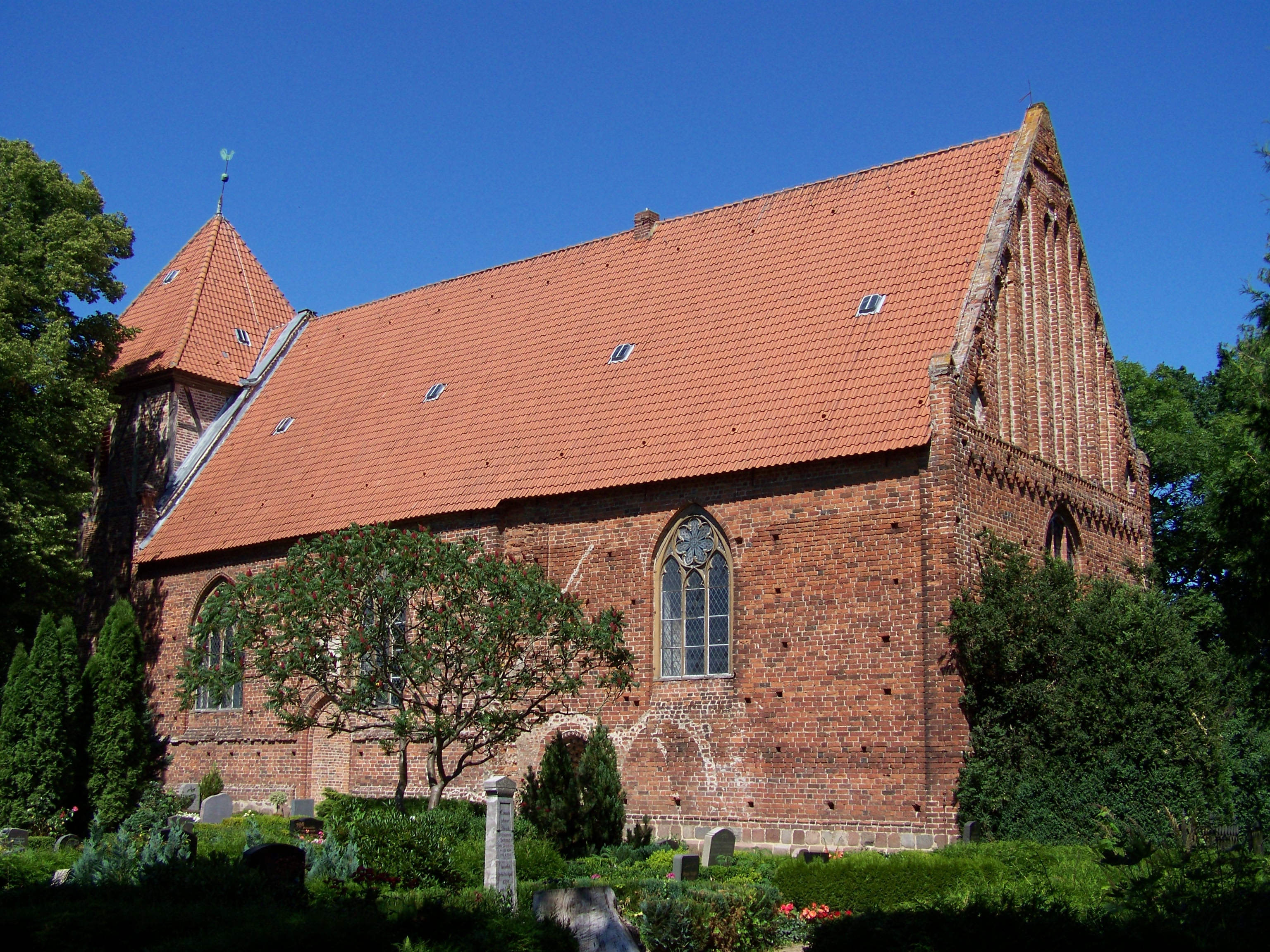 Die Kirche in Neuenkirchen (bei Greifswald), Gesamtansicht